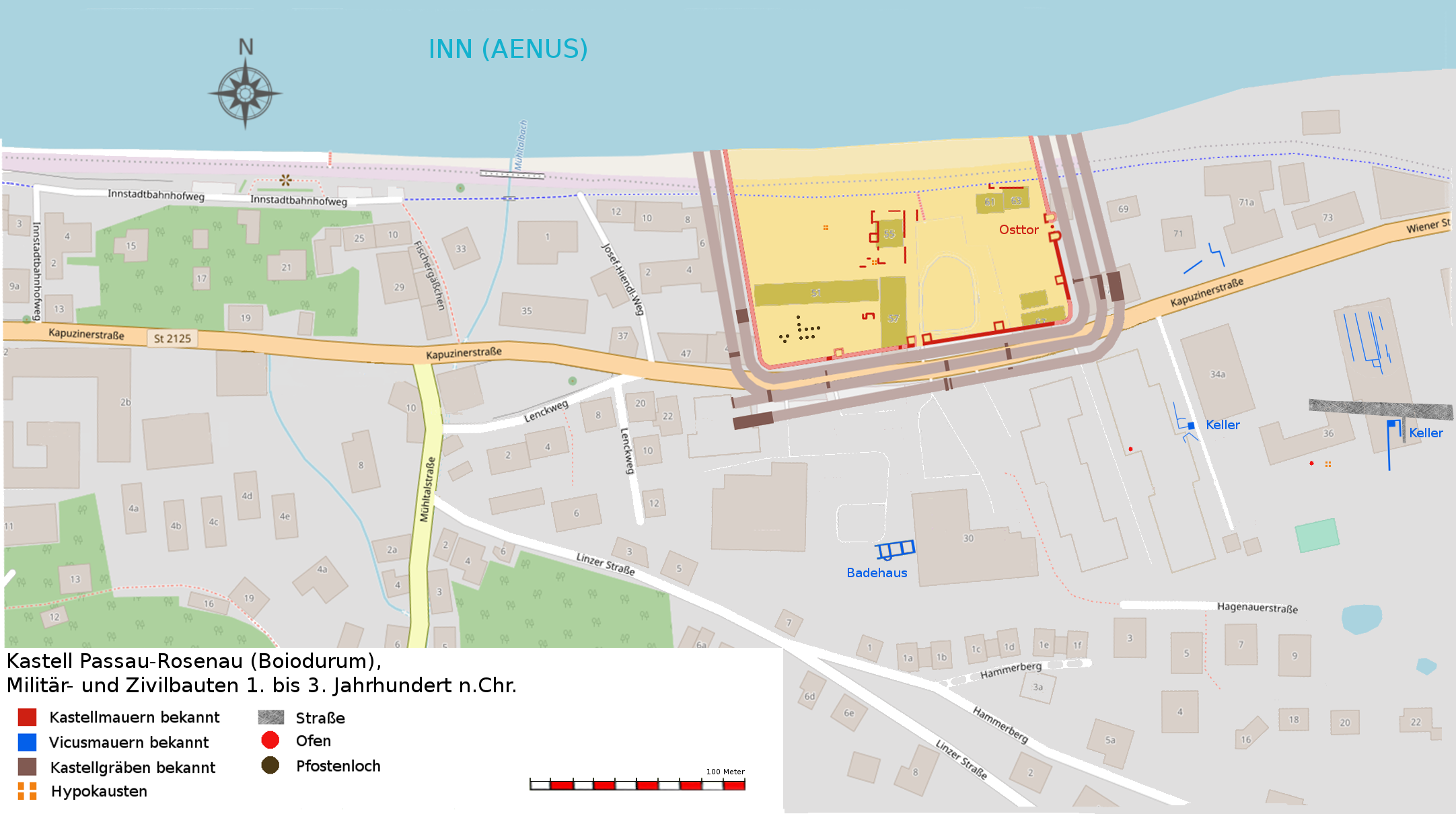 Befundskizze des Kastell Boiodurum, Passau-Innstadt/Rosenau, Ostufer des Inns, Provinz Noricum. Gesichert ist nur die Umwehrung und die Rückseite der Principia. Der Nordteil wurde im Laufe der Zeit vom Inn wegerissen. Südlich des Kastells wurde die Lagertherme nachgewiesen.